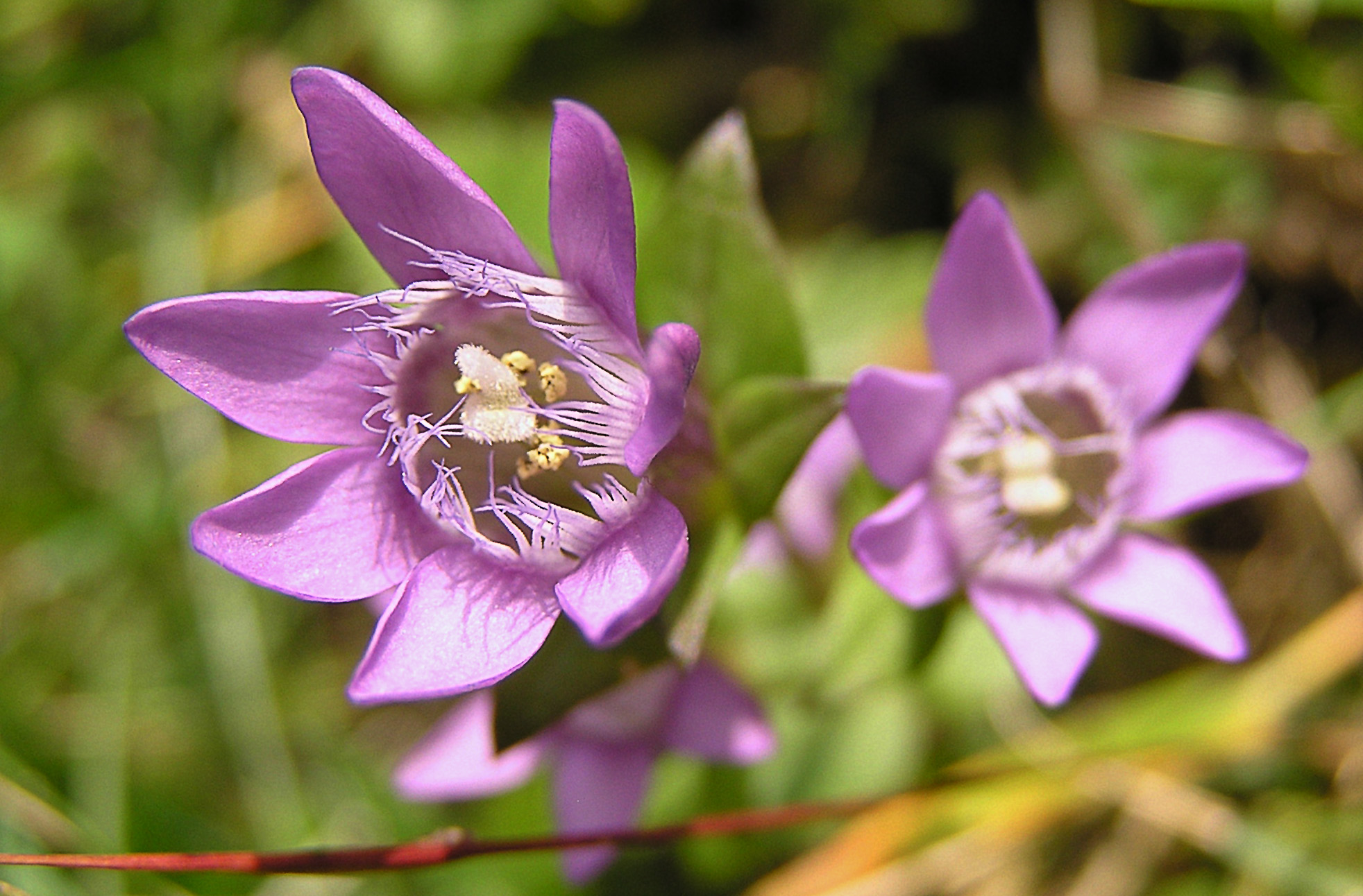 Enzianart mit 7 Kronzipfeln Gentianella germanica